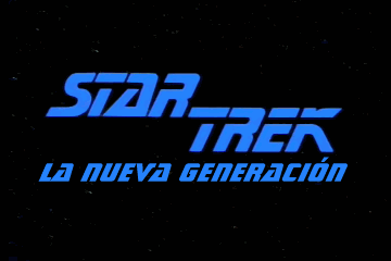 Logo Star Trek: la nueva generación